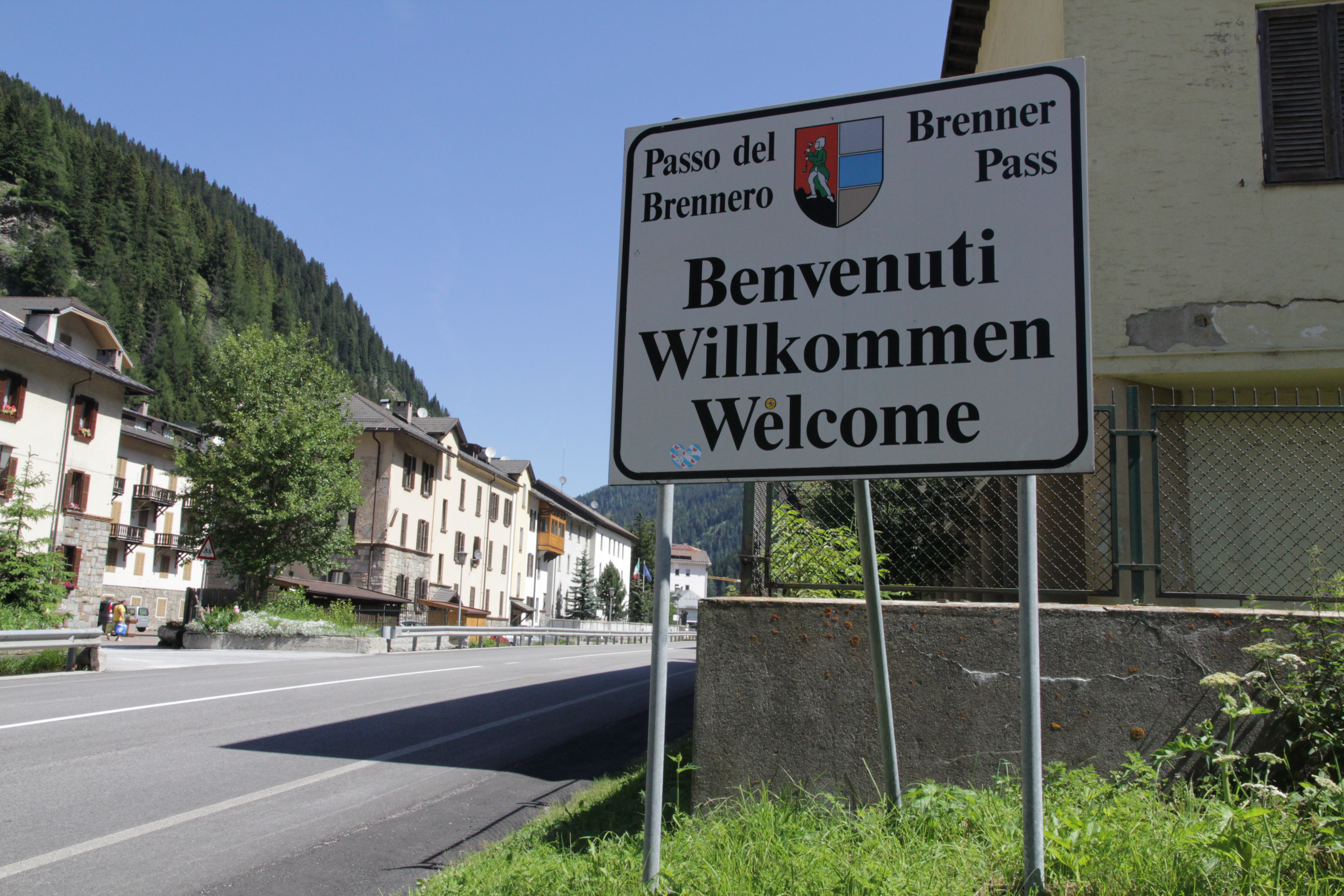 Passo Brennero/Brennerpass